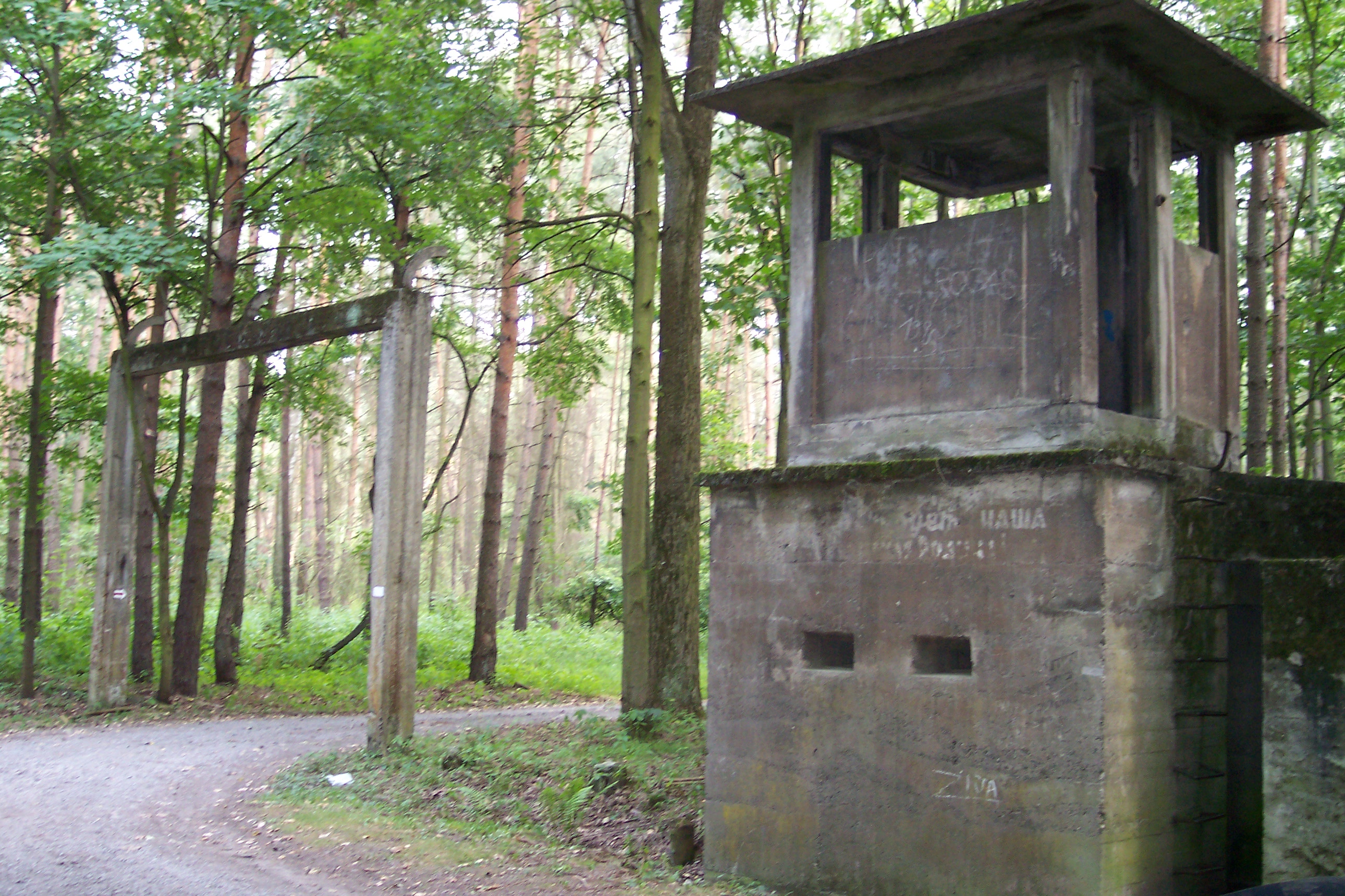 Obóz pracy Blechhammer w Sławięcicach (dzielnicy Kędzierzyna-Koźle)